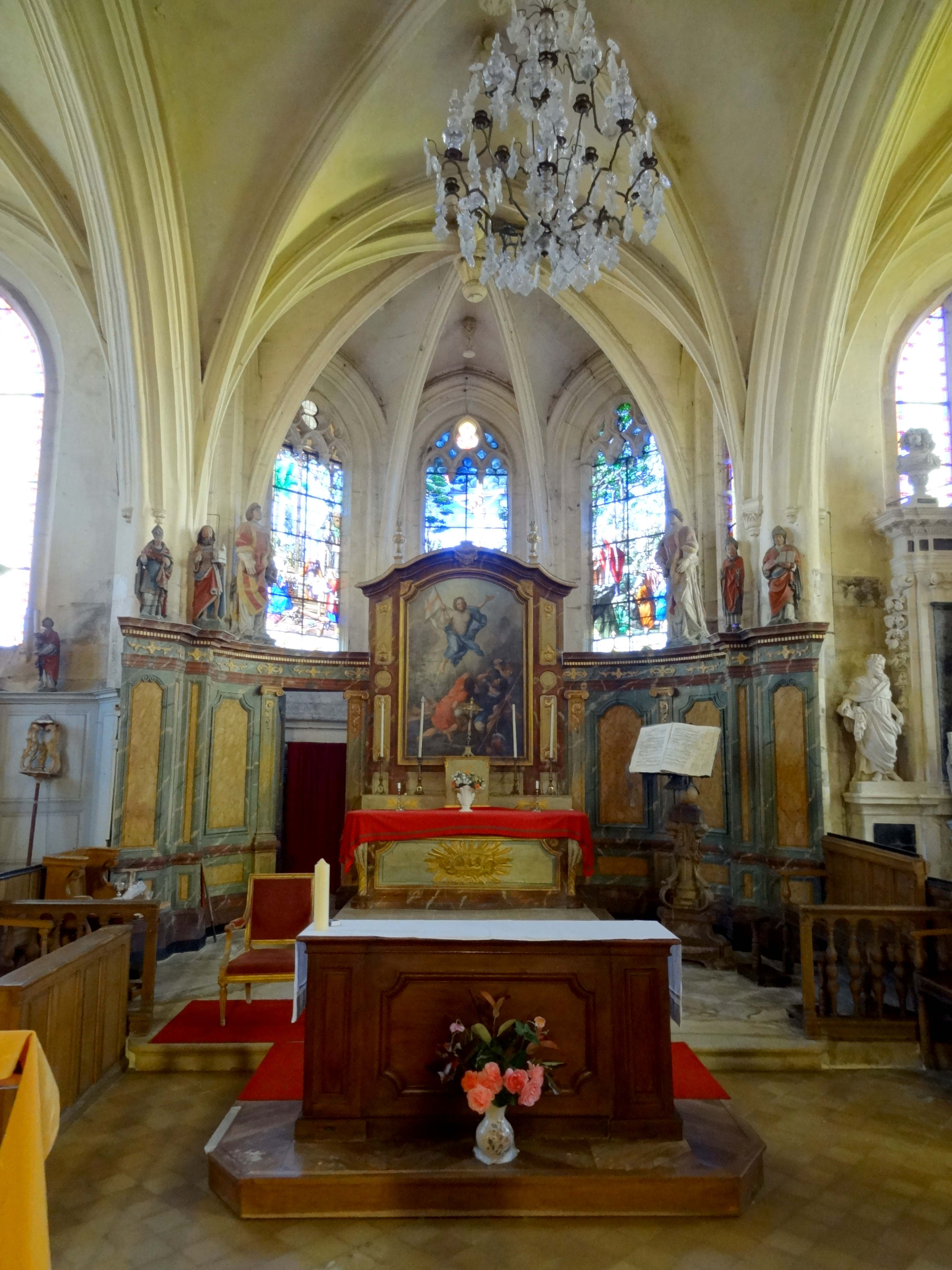 Intérieur de l'église - voir titre.